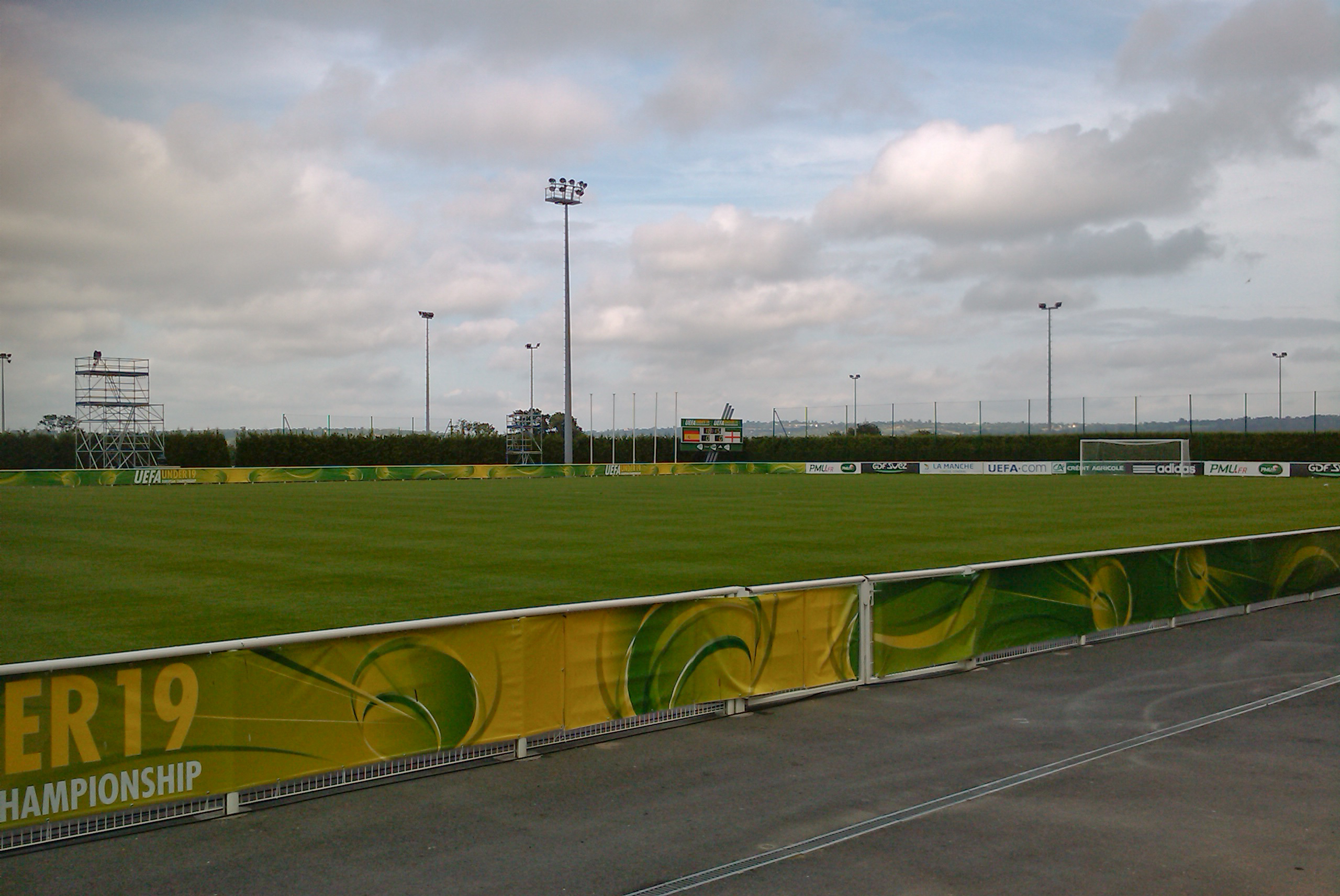 Stade Saint-Lô avant la demi finale Espagne-Angleterre de Championnat d'Europe de football des moins de 19 ans 2010